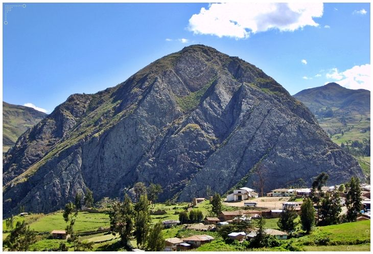 Angasmarca